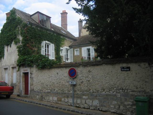 Moret-sur-Loing, Seine-et-Marne, Frankreich: Haus von Alfred Sisley